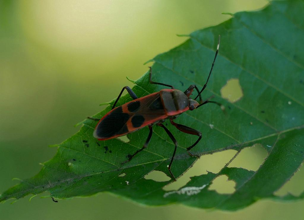 2019/06/13 和歌山県田辺市：Tanabe City. Wakayama Pref. Japan